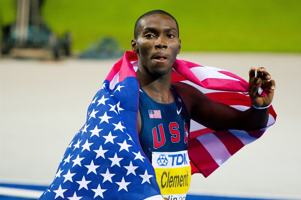 Kerron Clement - Weltmeister im 400m Hürdenlauf